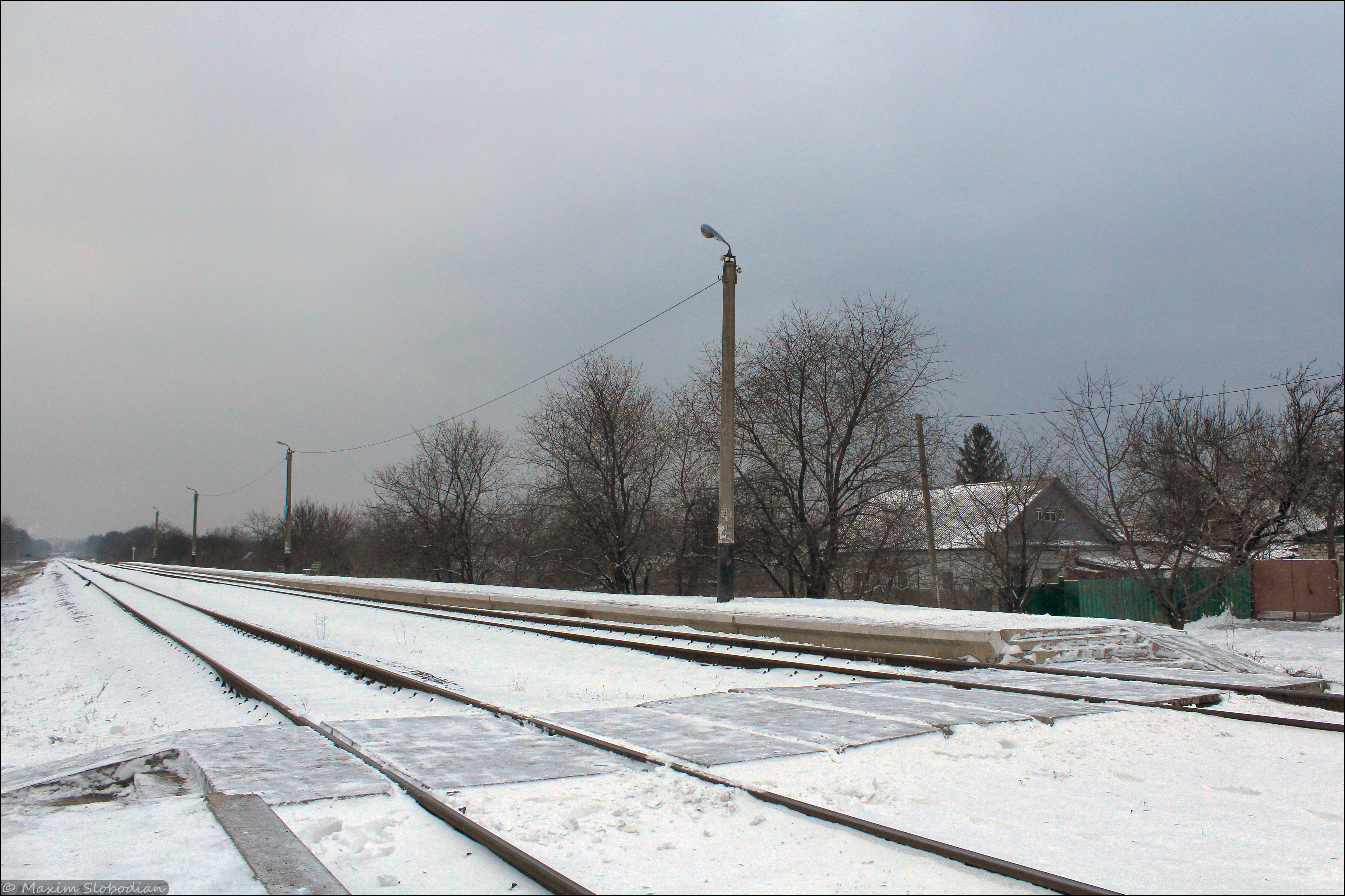 Платформа "ЗТА" (г. Черкассы).